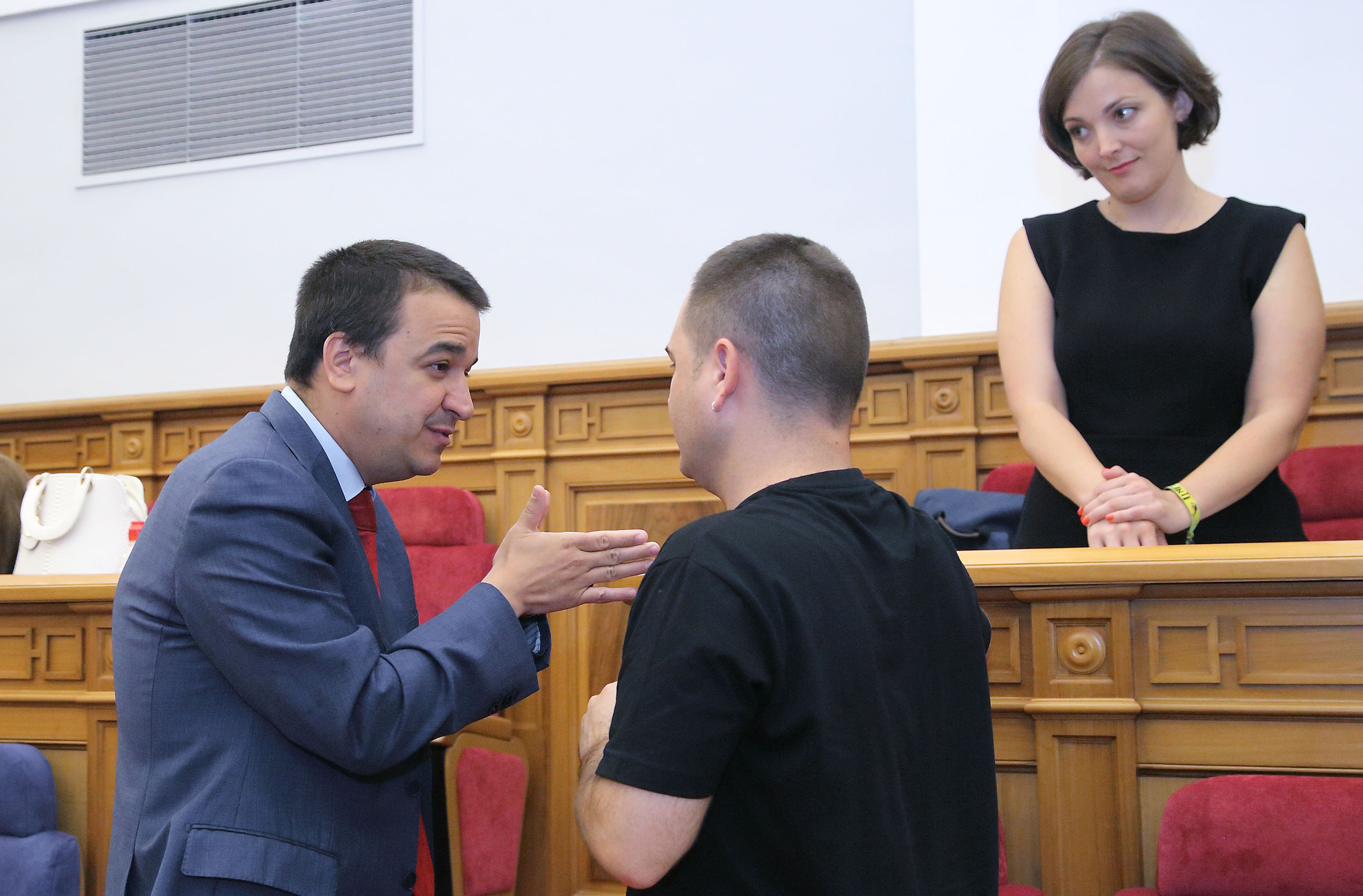 Toledo, 7-07-2016.- El consejero de Agricultura, Medio Ambiente y Desarrollo Rural de Castilla-La Mancha, Francisco Martínez Arroyo, conversa con el diputado David Llorente en presencia de la diputada, Rosario García Saco, al inicio del Pleno de las Cortes regionales celebrado hoy en Toledo. (Foto: Álvaro Ruiz // JCCM)